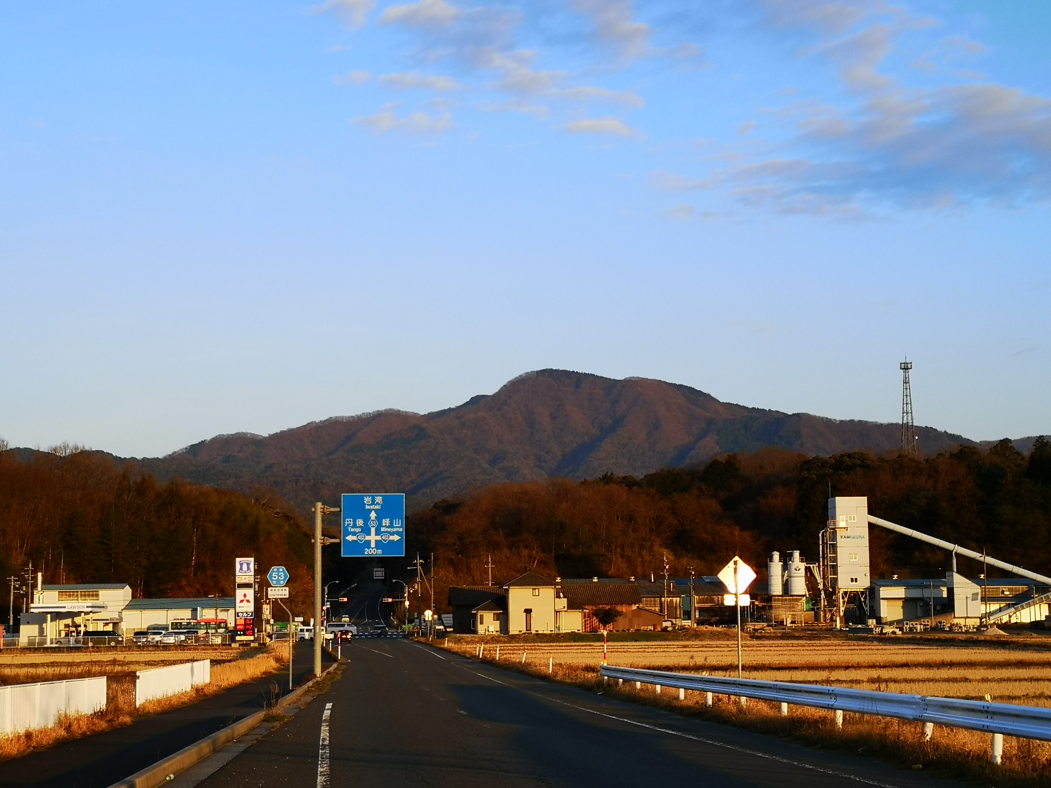 網野ー弥栄 京都府道53号から見た金剛童子山